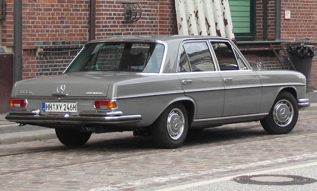 Heckansicht des Mercedes W108 in der Hamburger Speicherstadt